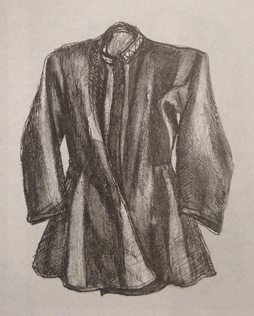 Мужской архалух. Лори. Конец XIX в.